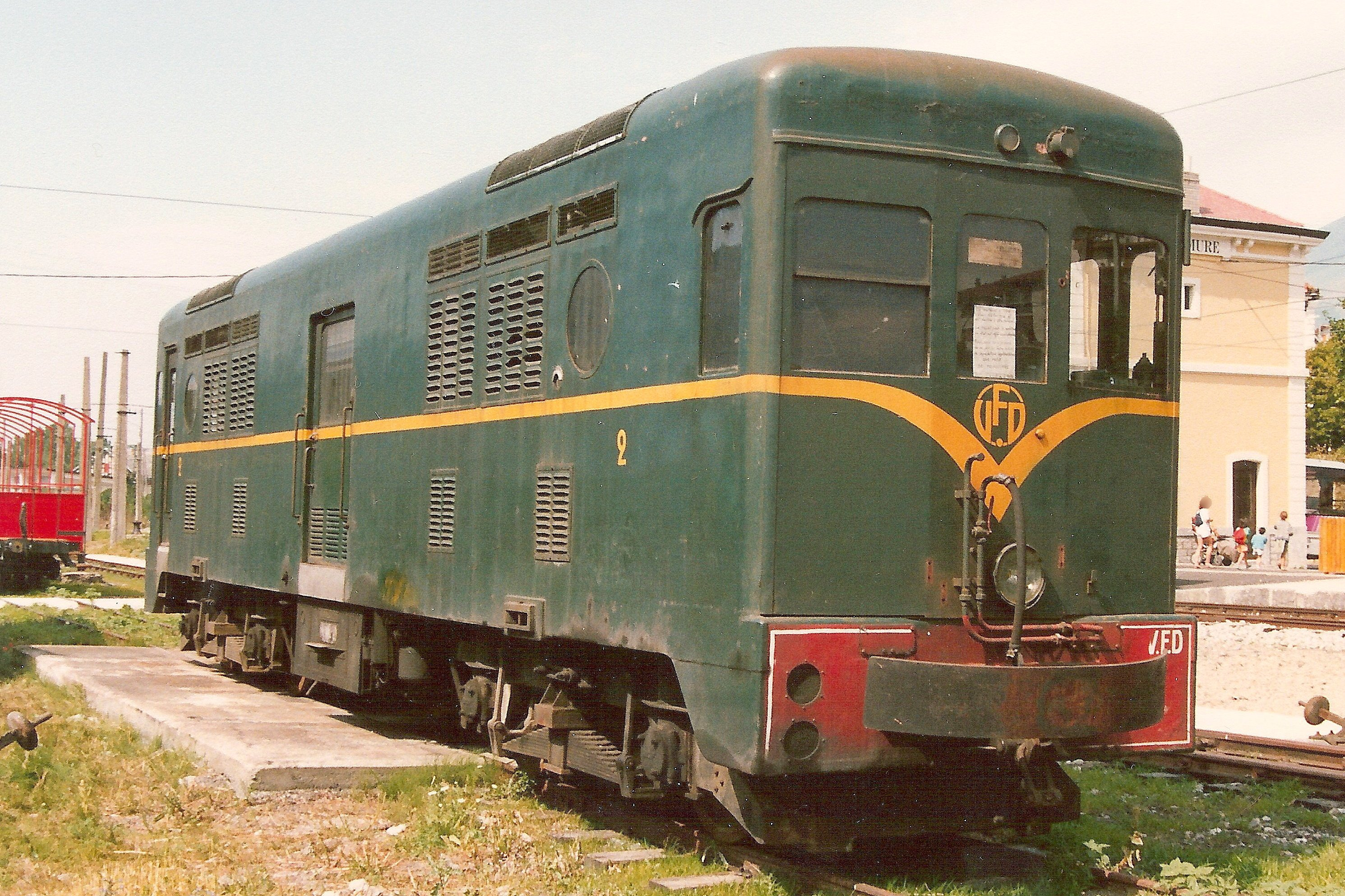 Photo 2. Locomotive VFD Brissonneau et Lotz à La Mure (ligne SGLM).